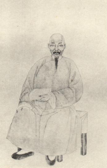 清代学者。Huang Yizhou